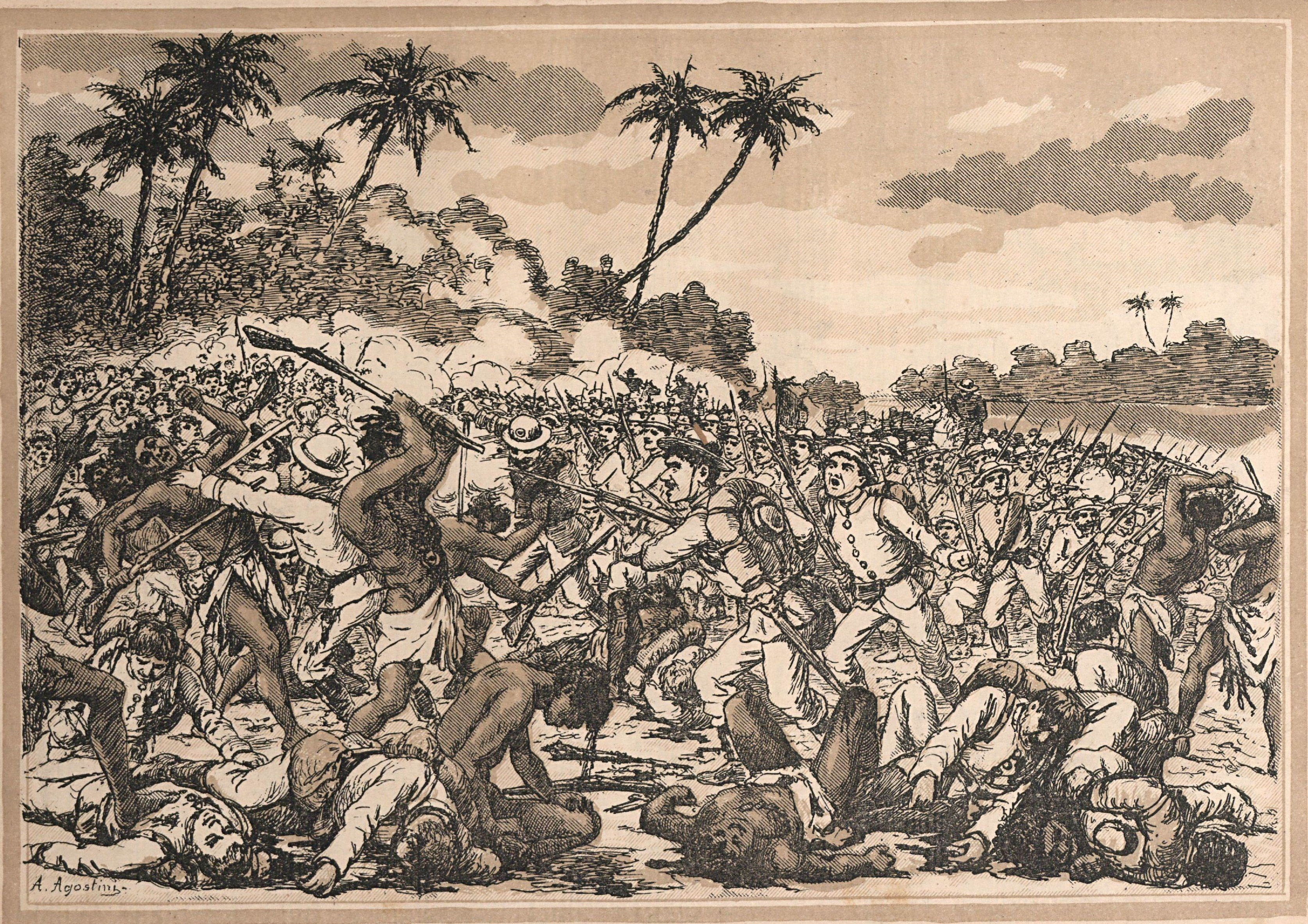 Leyenda original traducida al español: «Portugal en África. La emboscada de los kwanyama en el claro de un bosque, cerca del río Cunene (Angola). Las tropas portuguesas, compuestas de 500 hombres combaten cuerpo a cuerpo con el gentío rebelde, feroz y traicionero, en número diez veces superior».